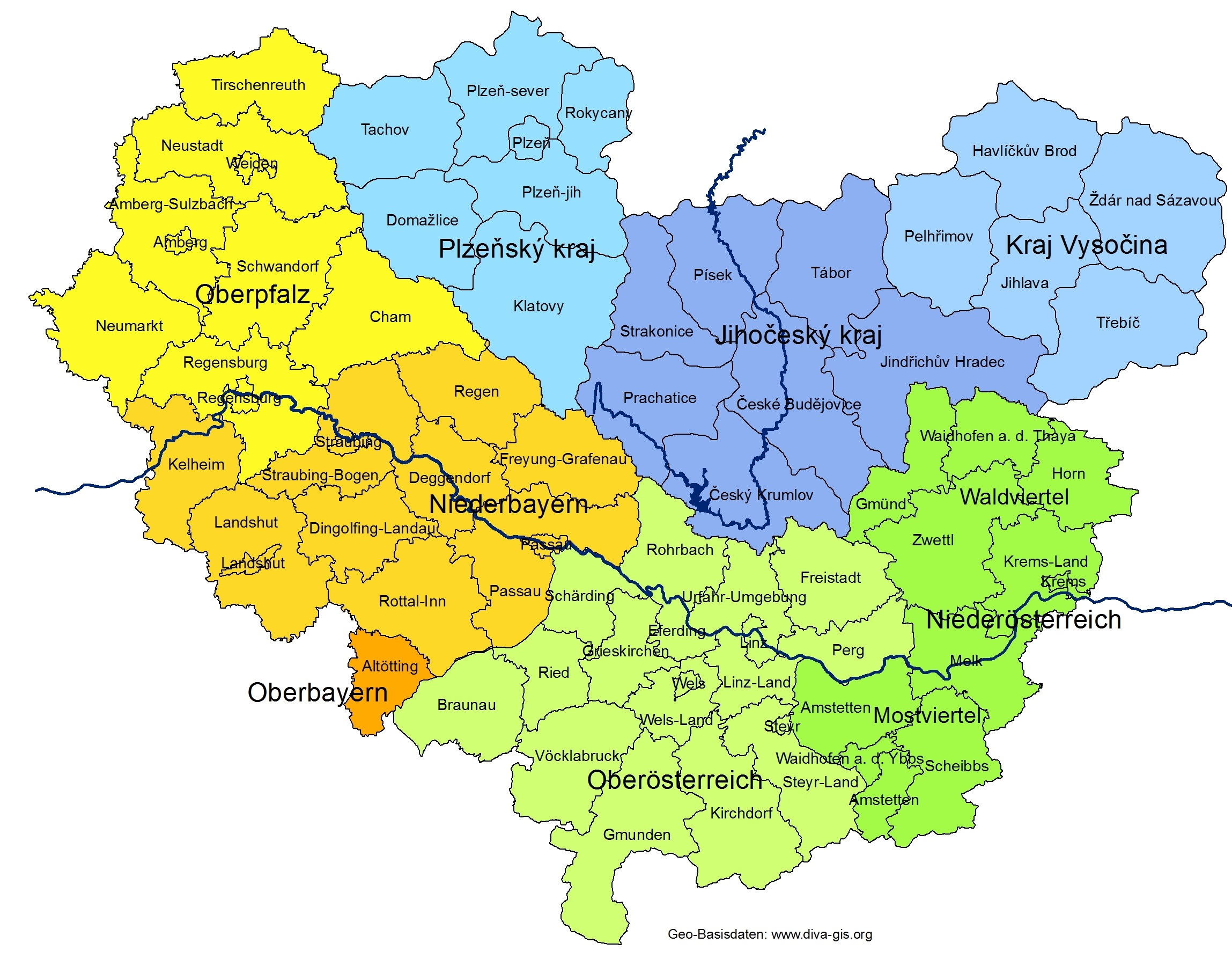 Projektgebiet der EDM